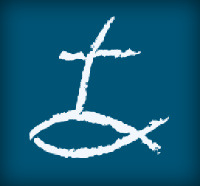 Medzinárodné logo starokatolíckych cirkví.